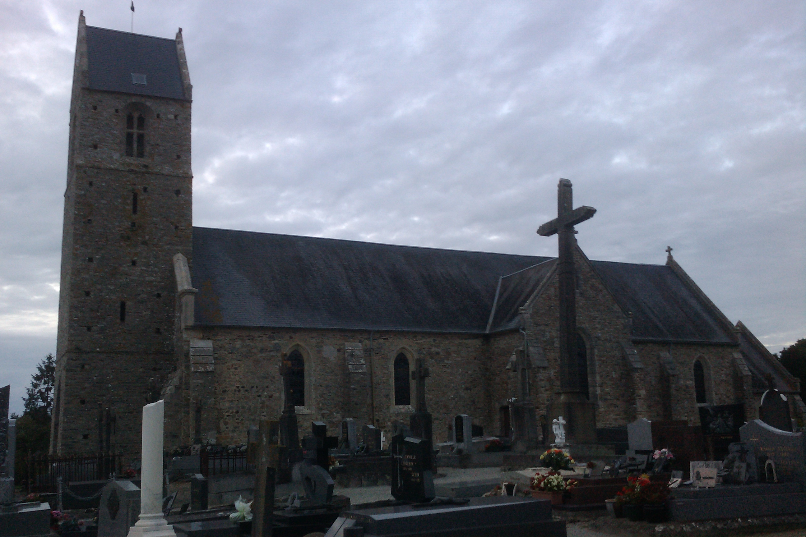 Église du Mesnil-Vigot